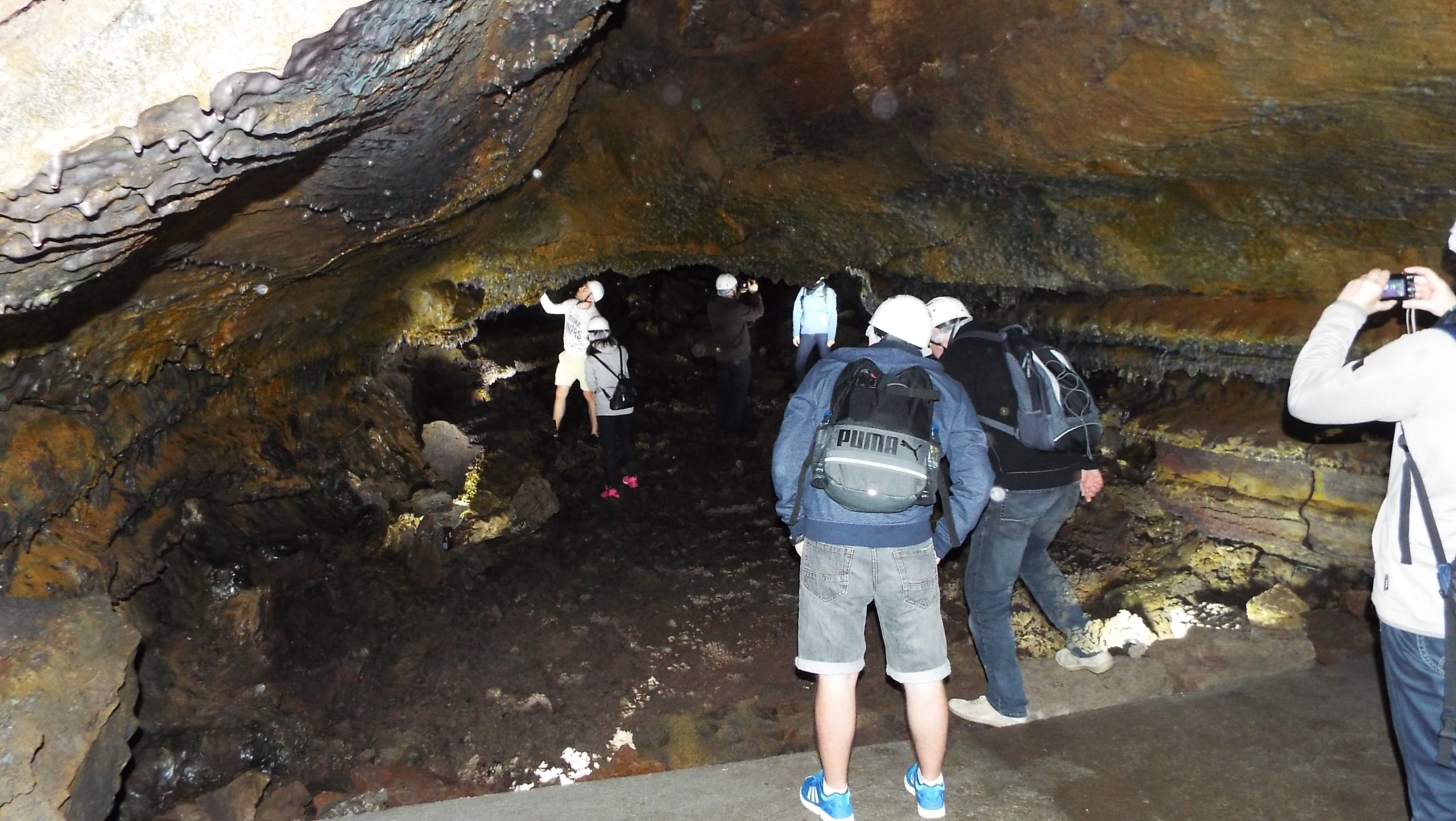 Die Gruta do Carvão (übersetzt: Kohle-Höhle) ist eine geologische Formation der portugiesischen vulkanischen Ursprungs befindet sich in der Gemeinde Ponta Delgada, São Miguel, Azoren. Sie kann Samstag besichtigt werden.